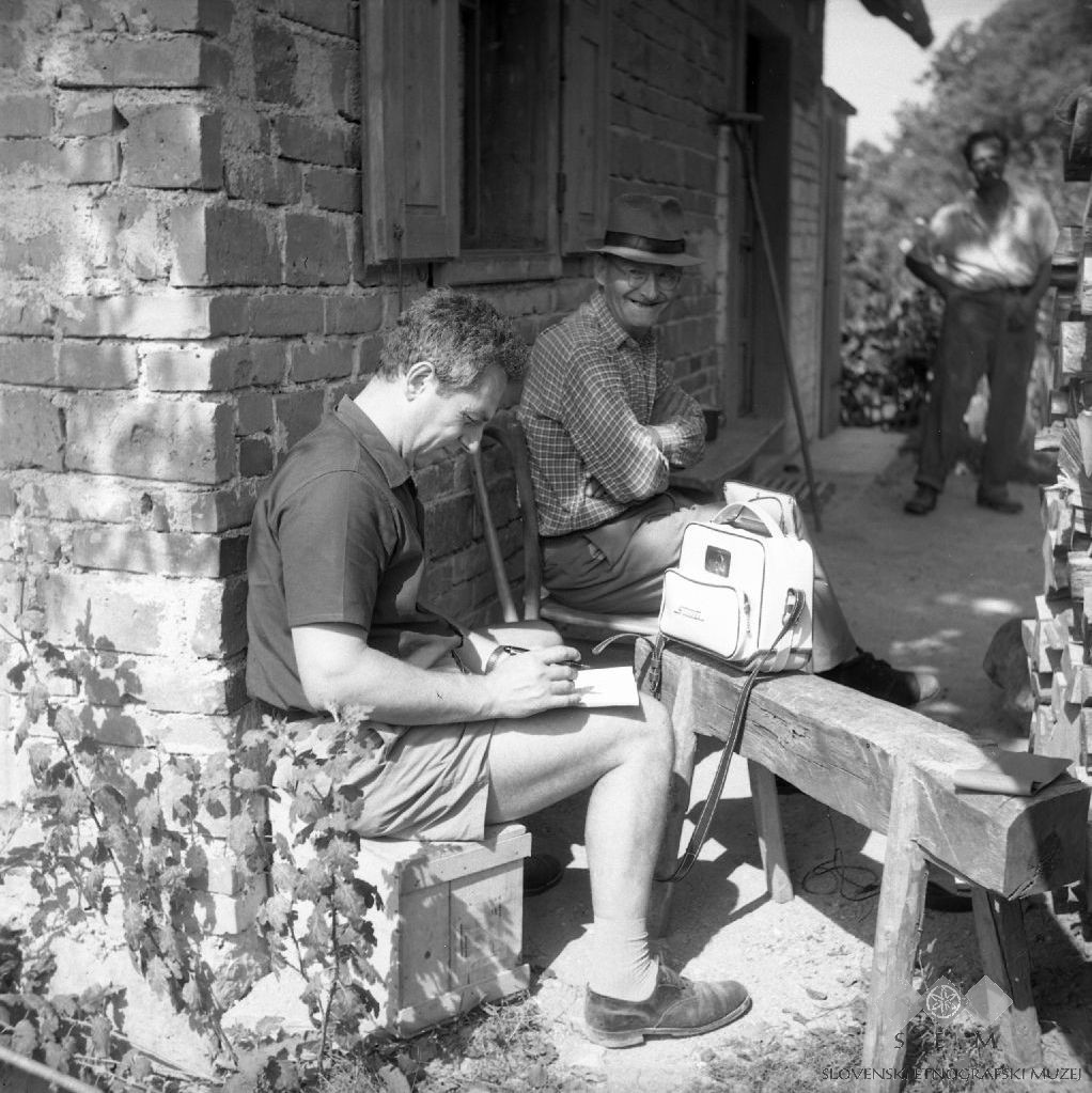 Pri ljudskem pravljičarju Hlebcu; zapisuje dr. M. Matičetov. Sv. Križ.